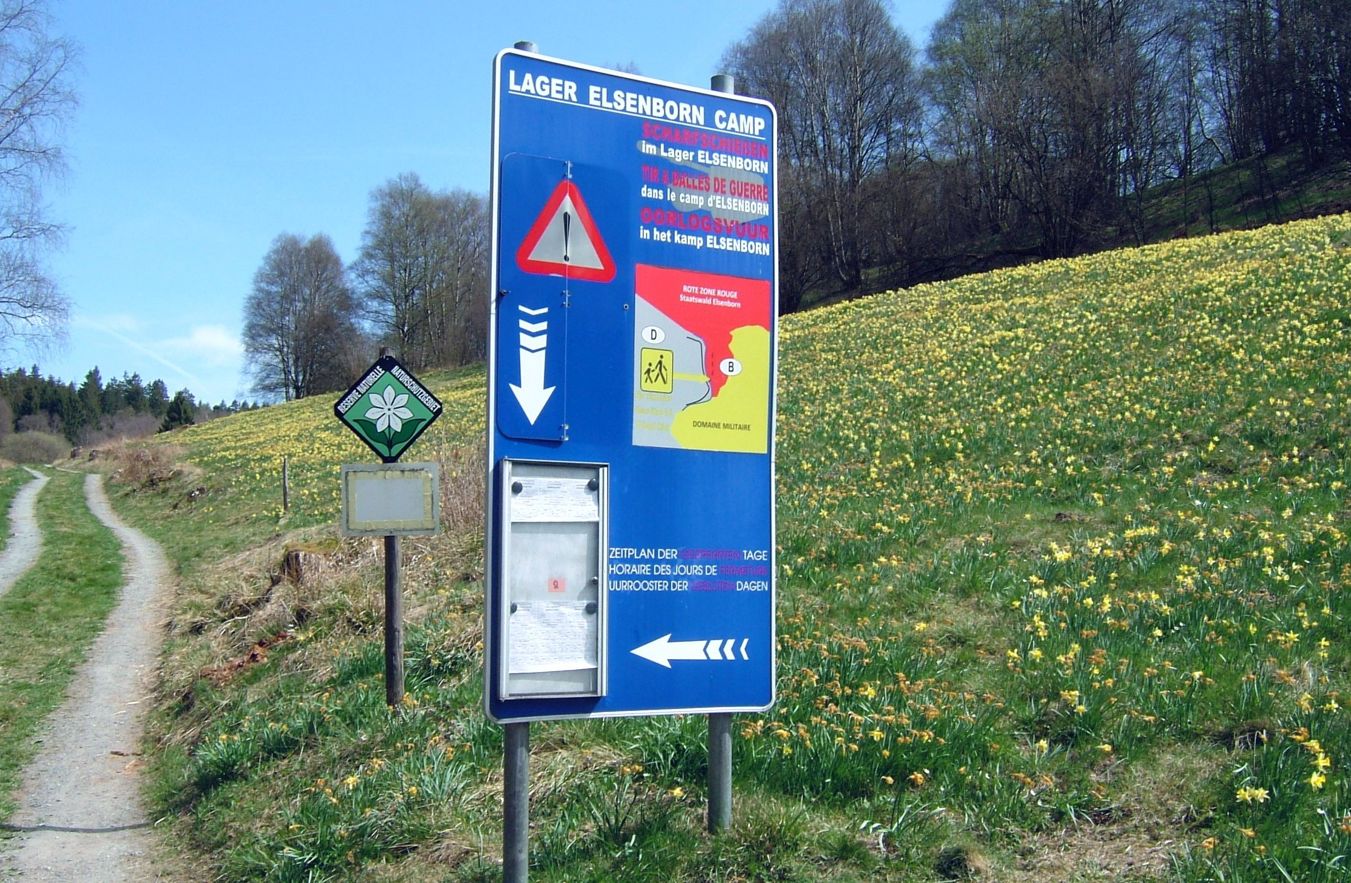 Infotafel mit Sperrzeiten wegen Schießübungen auf dem Truppenübungsplatz Elsenborn